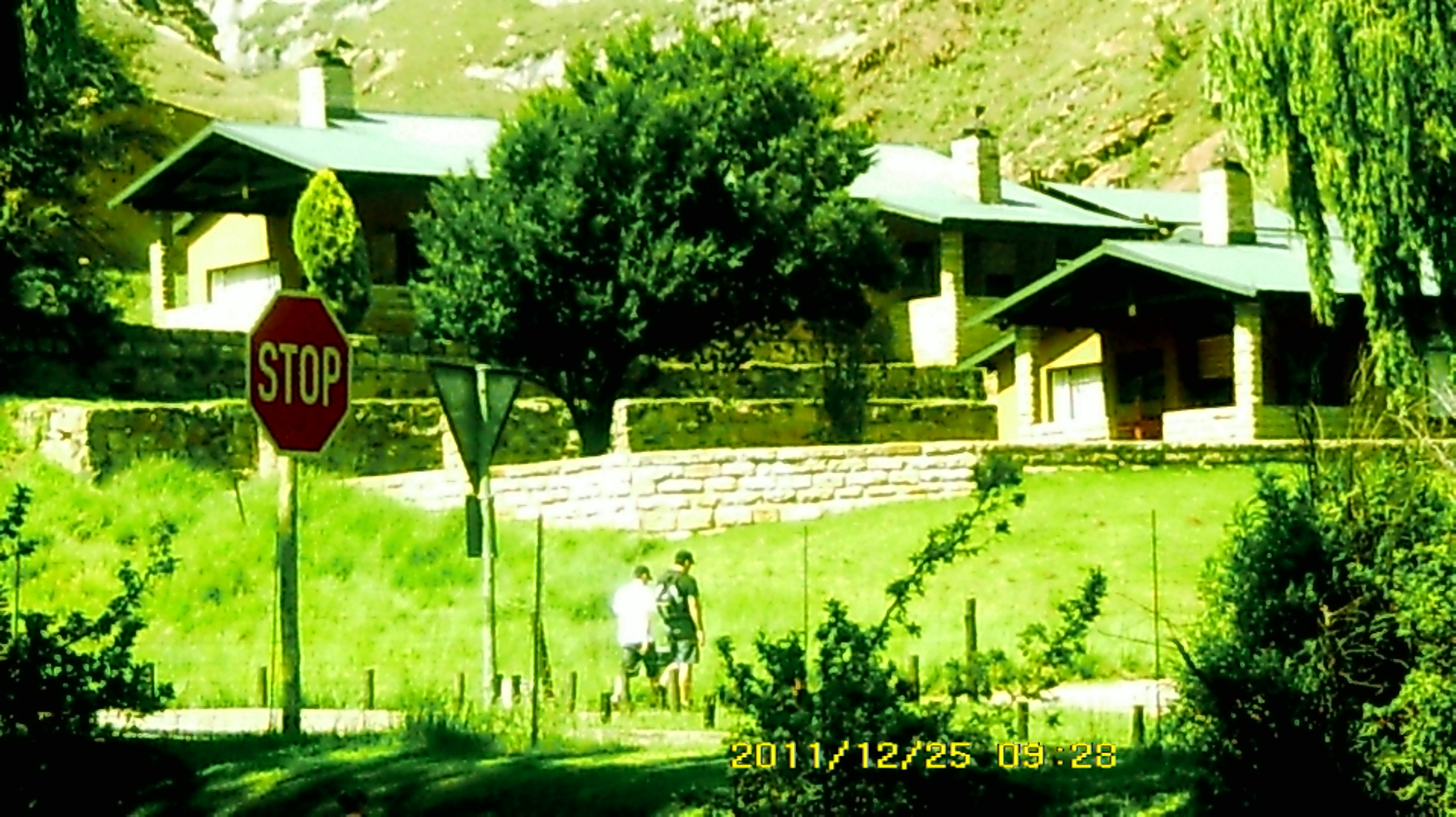 Glen Reenen in Golden Gate Nasionale Park